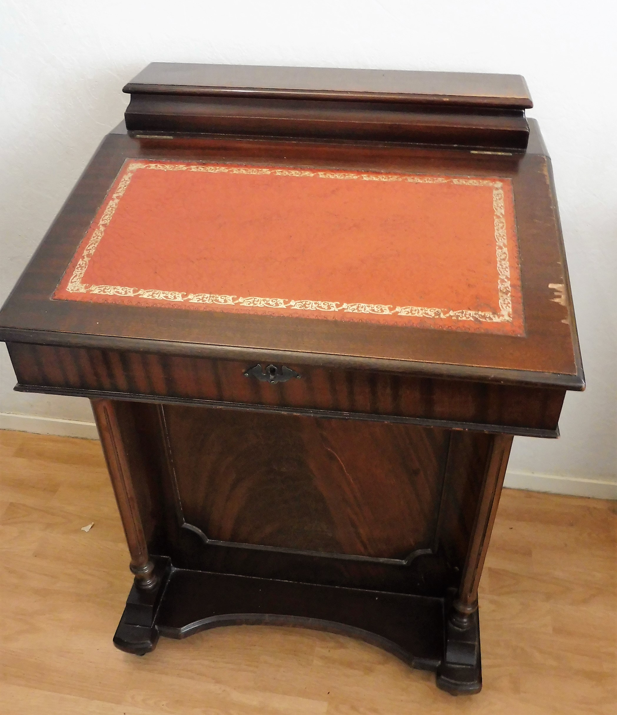 Vue de face d'une copie d'un secrétaire Davenport plaqué en acajou et réalisé au XXe siècle